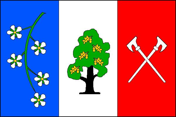 Vlajka obce Třemešné